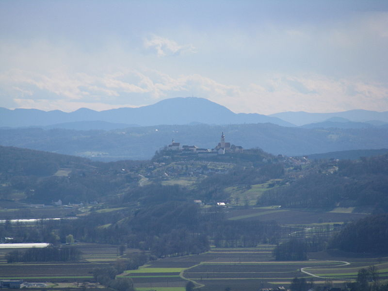 Straden, eine Marktgemeinde im Bezirk Radkersburg in der Steiermark